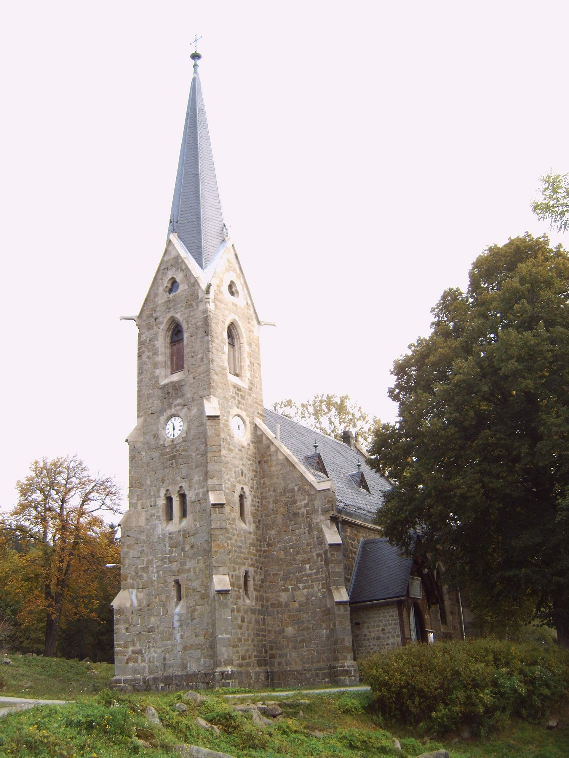 Schierker Bergkirche, Schierke, Harz, Sachsen-Anhalt, Deutschland